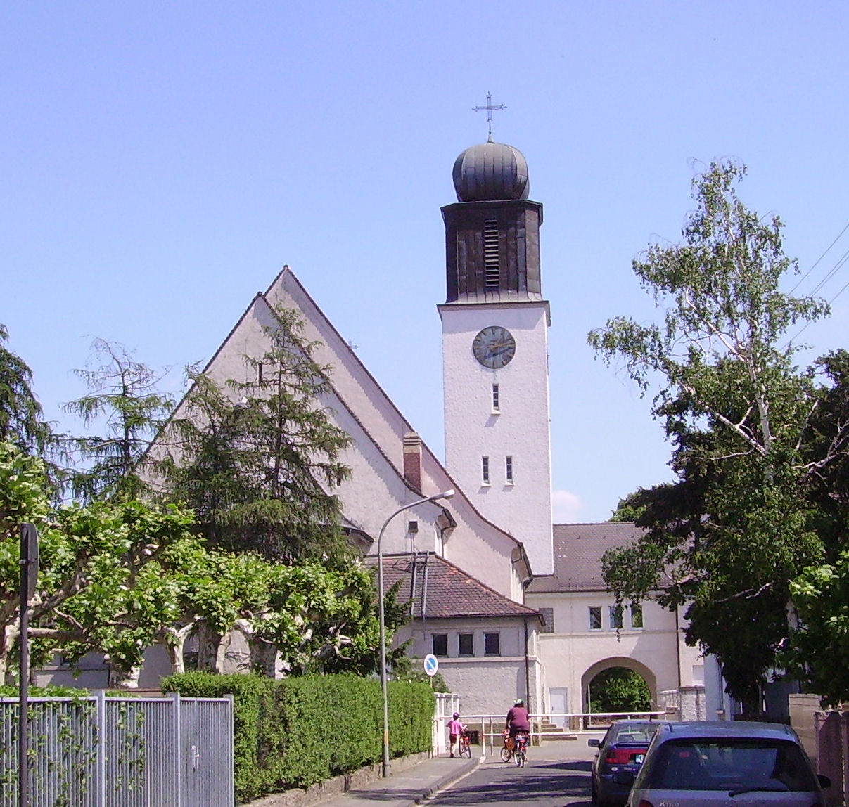 view of Rheingönheim, part of Ludwigshafen, Germany